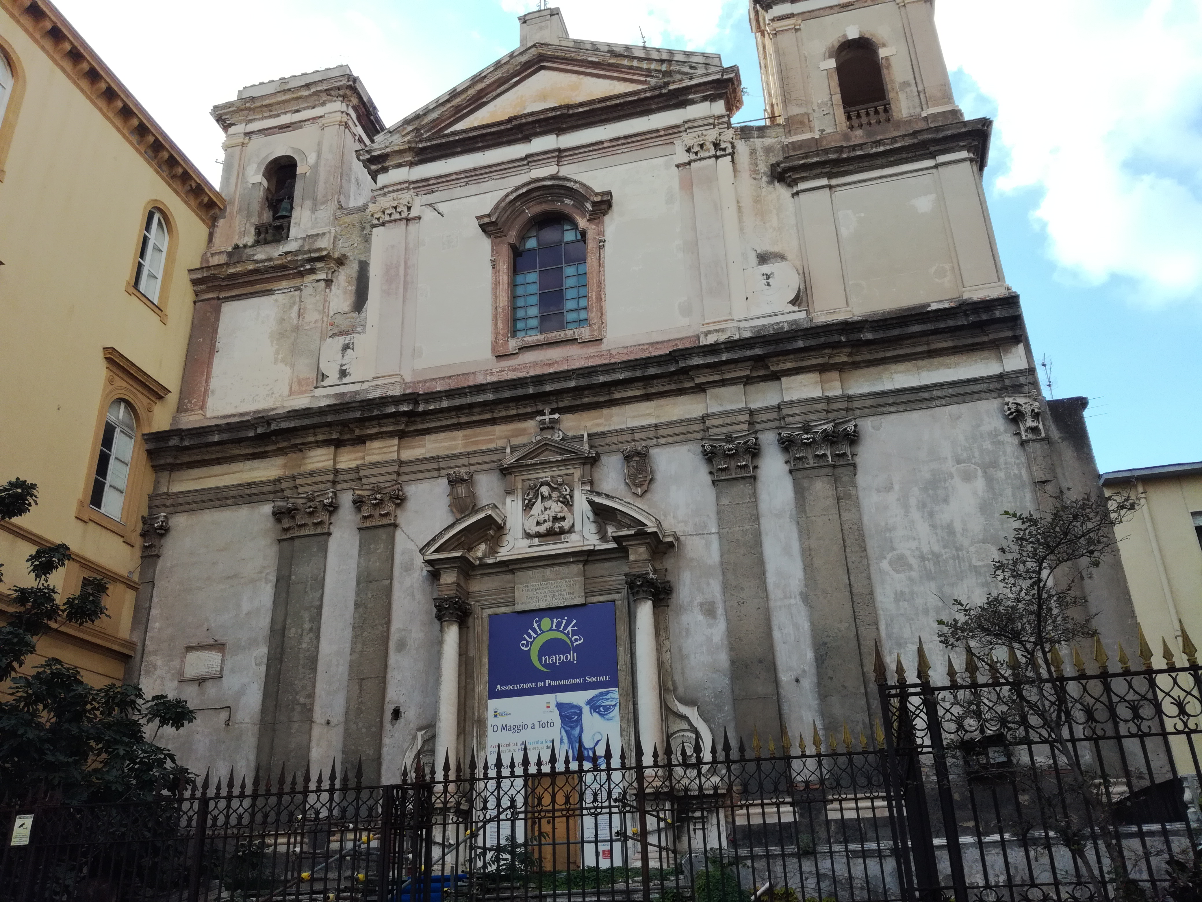 Facciata del Complesso di Gesù e Maria